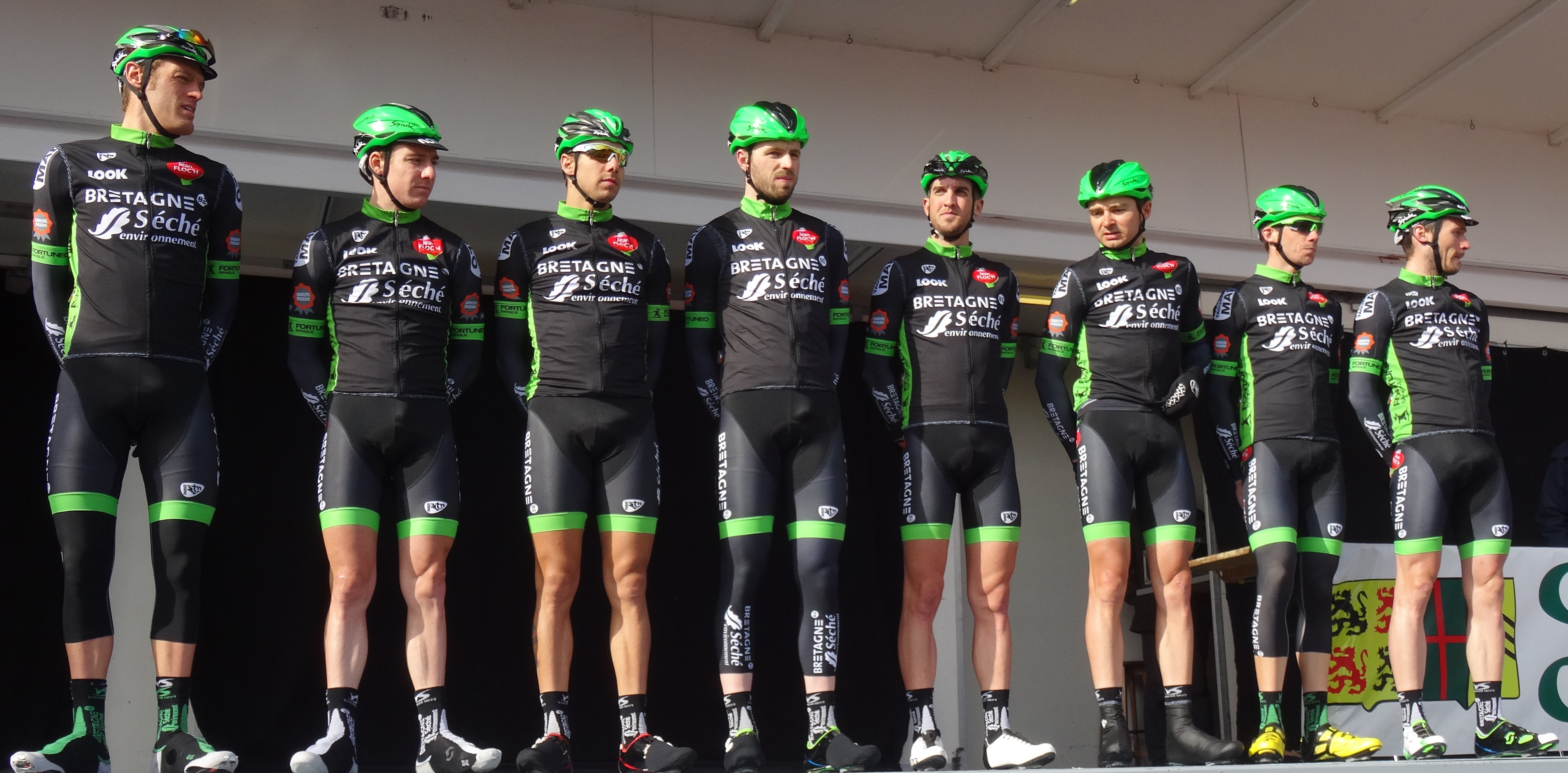 Reportage réalisé le mercredi 4 mars à l'occasion du départ du Samyn des Dames 2015 et du Samyn 2015 à Quaregnon, Belgique.